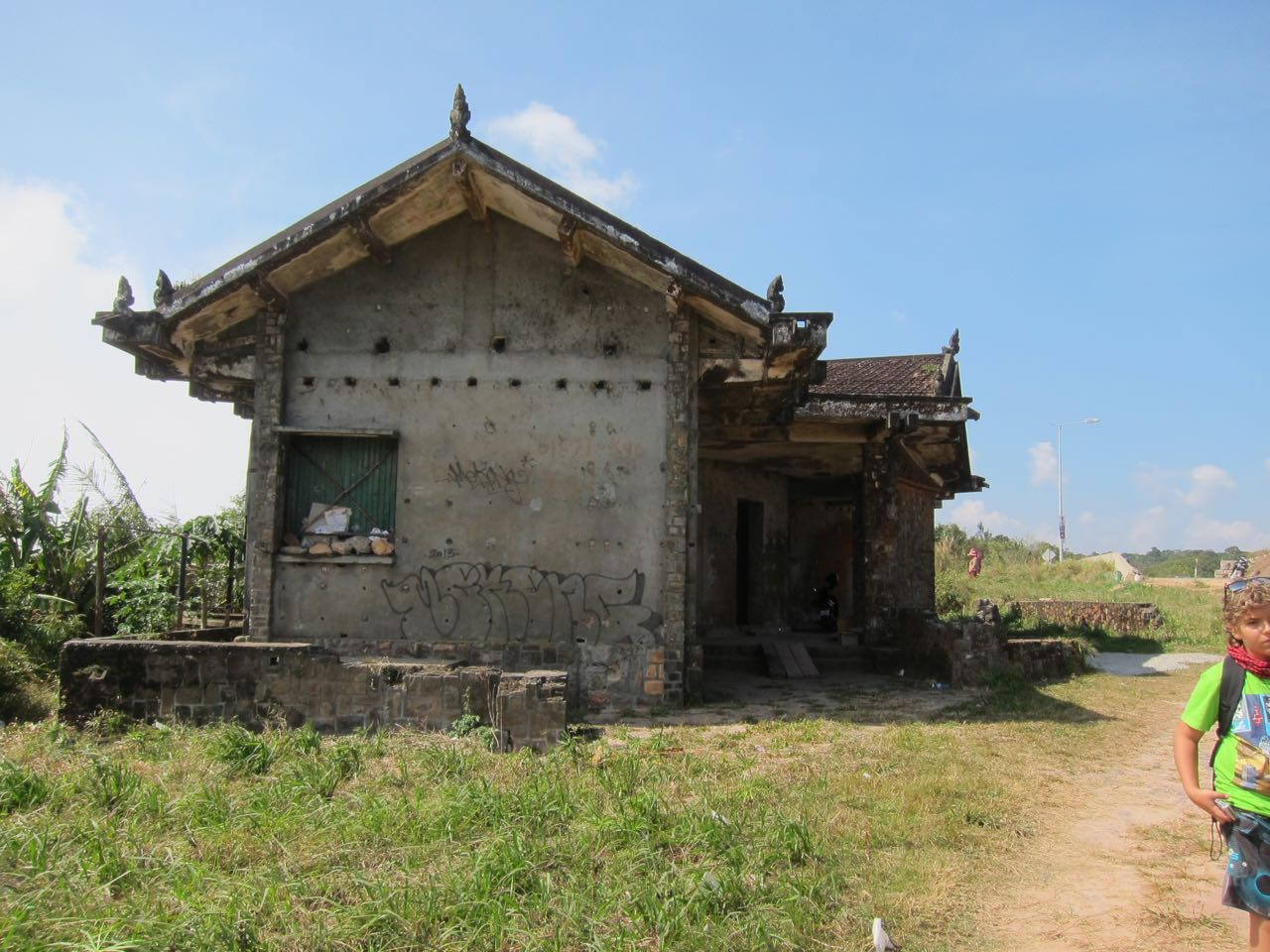 Palais de Norodom Sihanouk